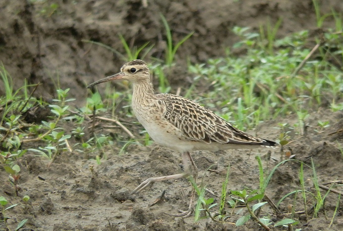 小杓鷸 Little Curlew Numenius minutus, Taoyuan, Taiwan